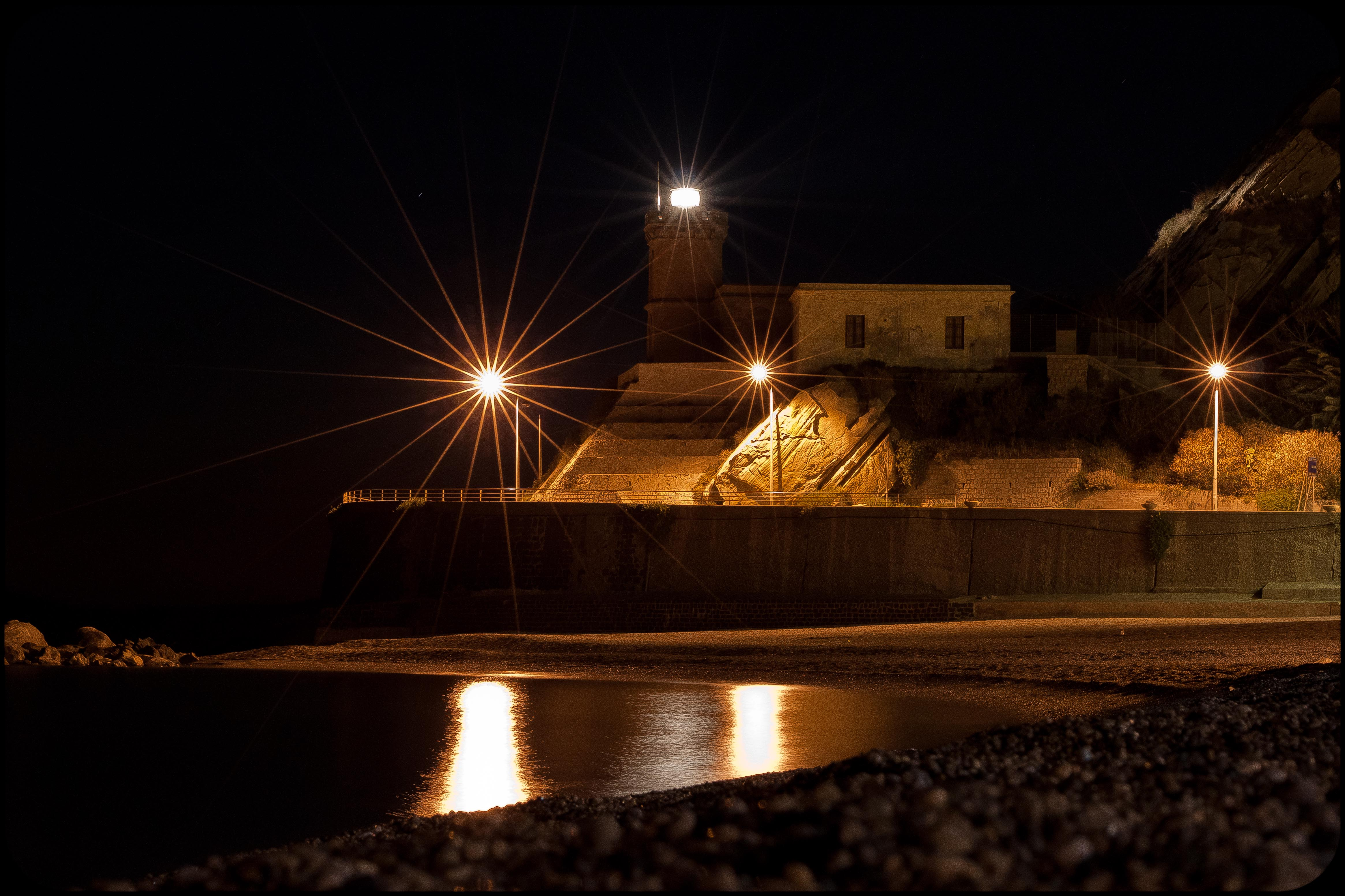 lighthouse capo d'orlando by night.